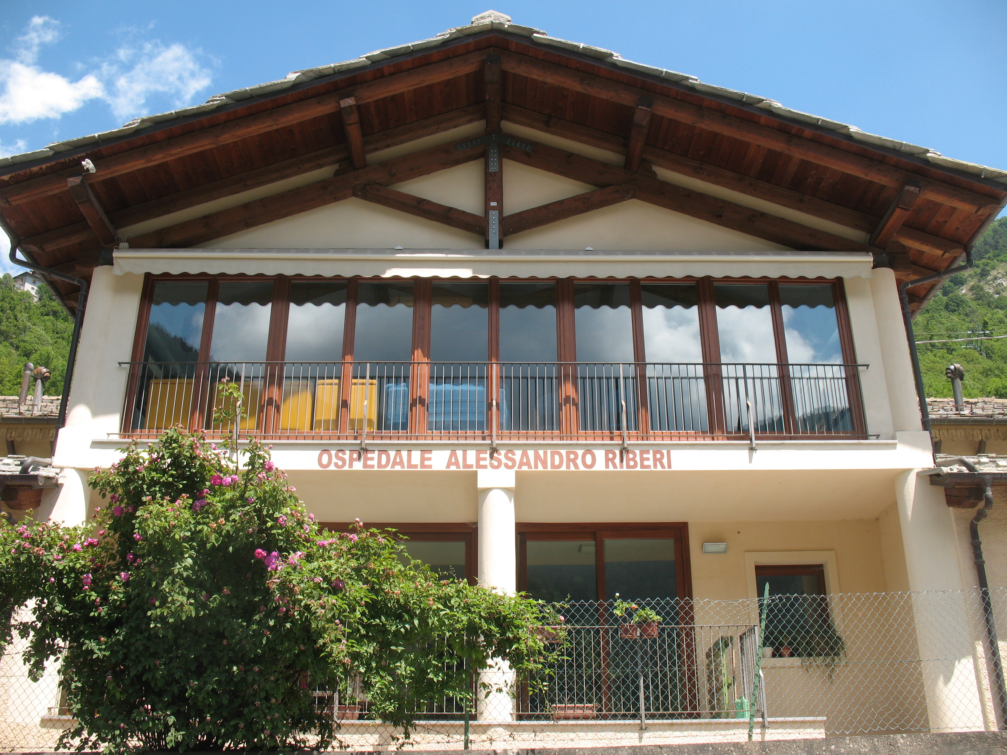 Ospedale Alessandro Riberi a Bassura, Borgata di Stroppo, nel Valle Maira, Piemonte